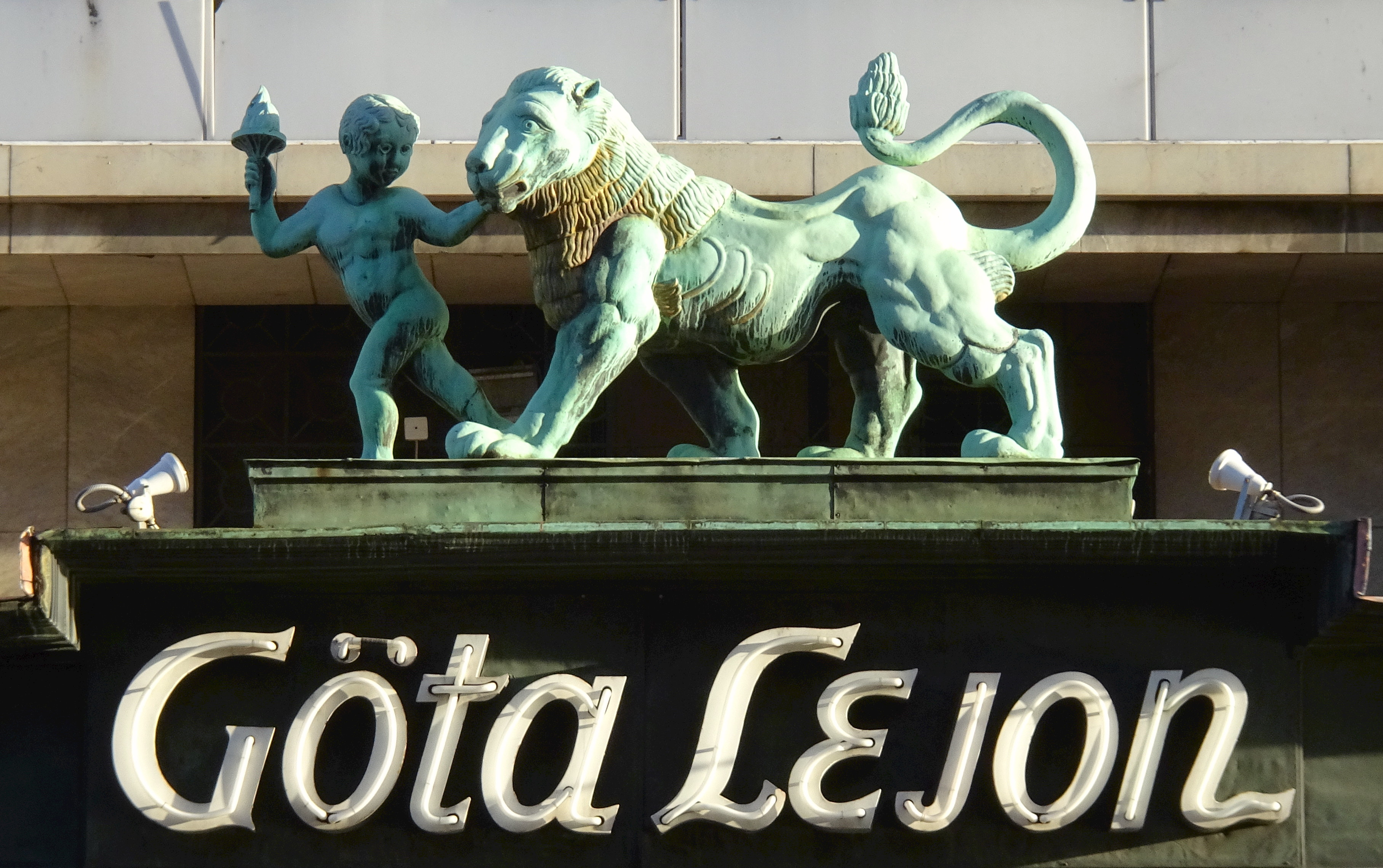 Göta Lejons entré